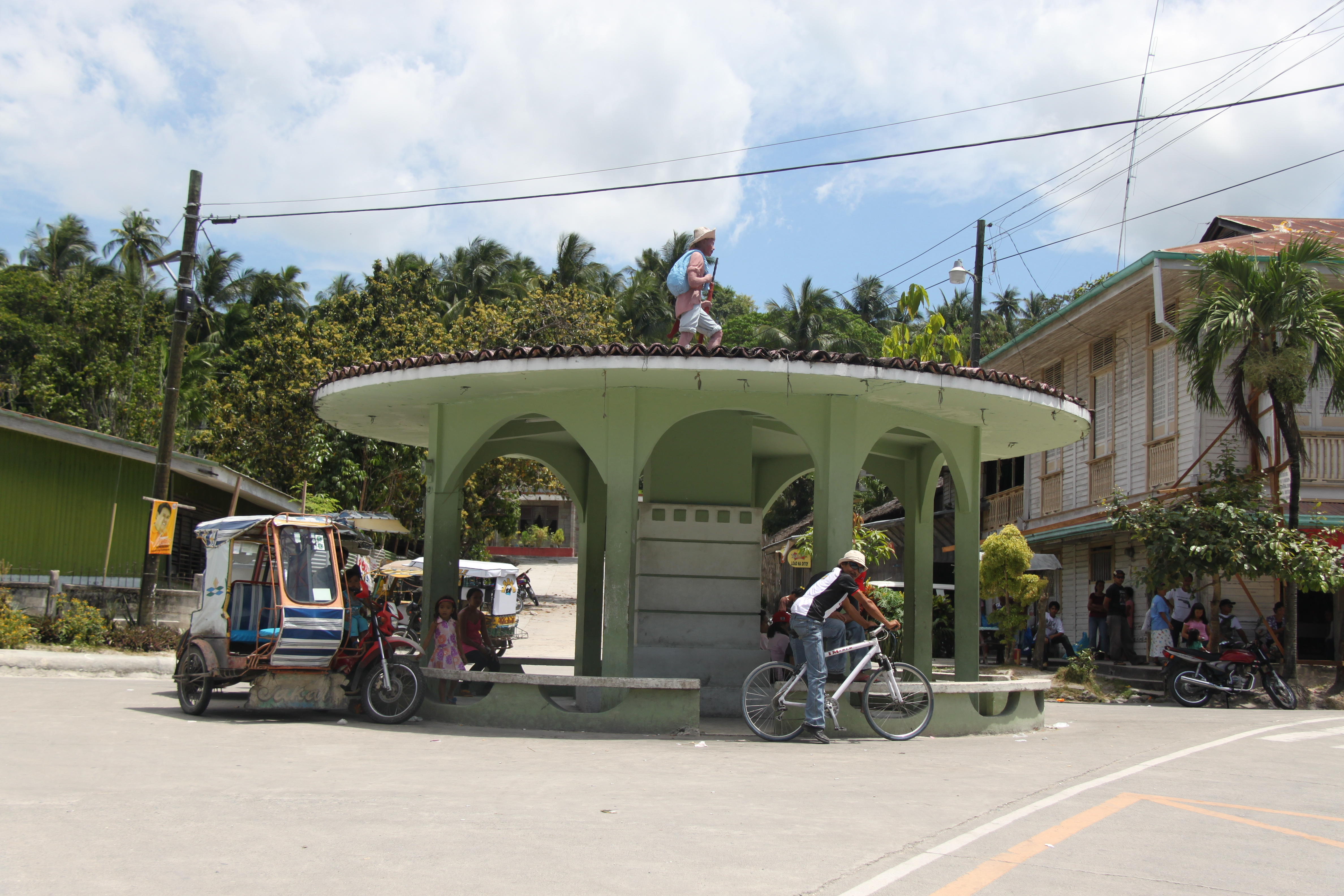 Samboan, Cebu, Philippines Philippines - February 2010